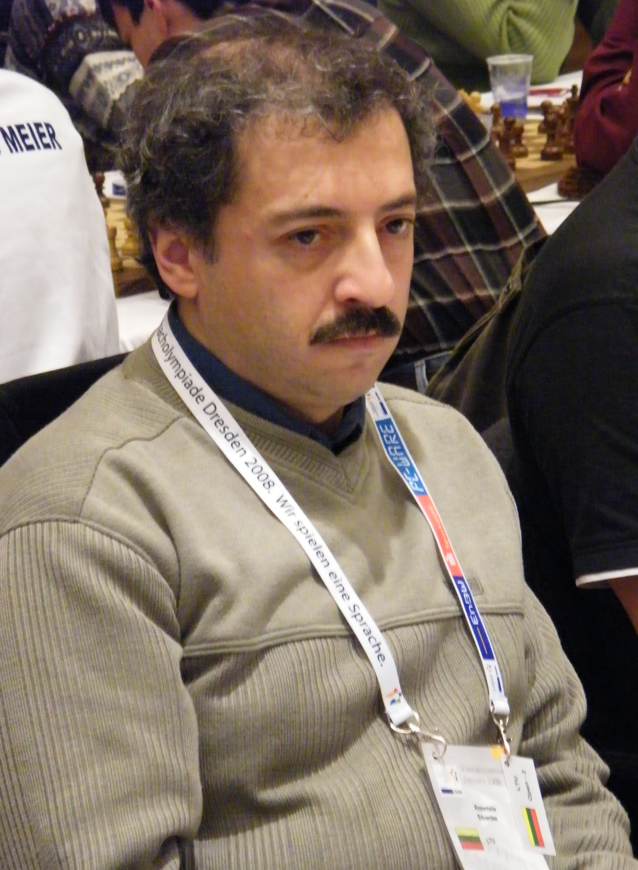 Eduardas Rozentalis bei der Schacholympiade 2008 in Dresden